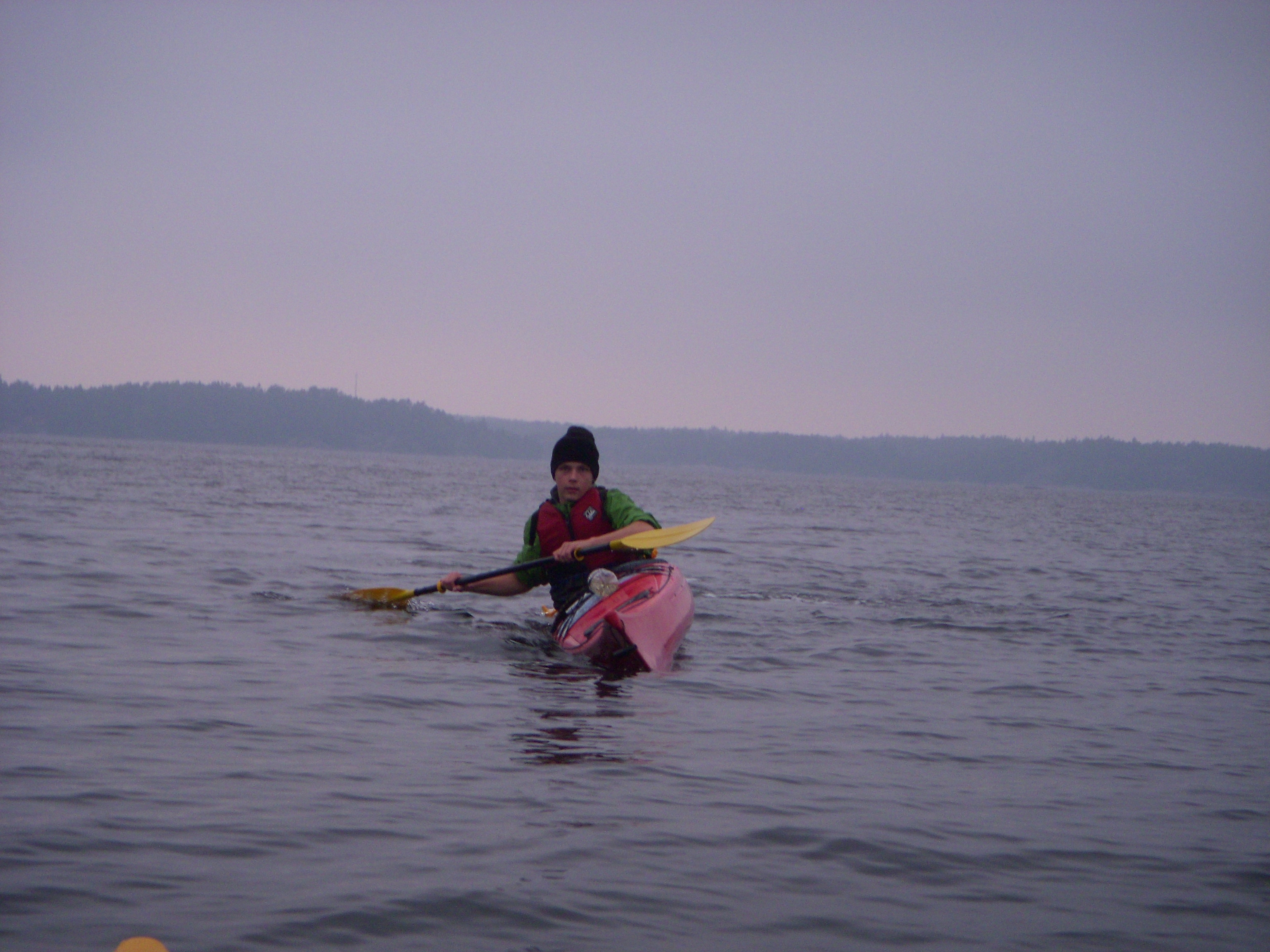 Exempel på kantning